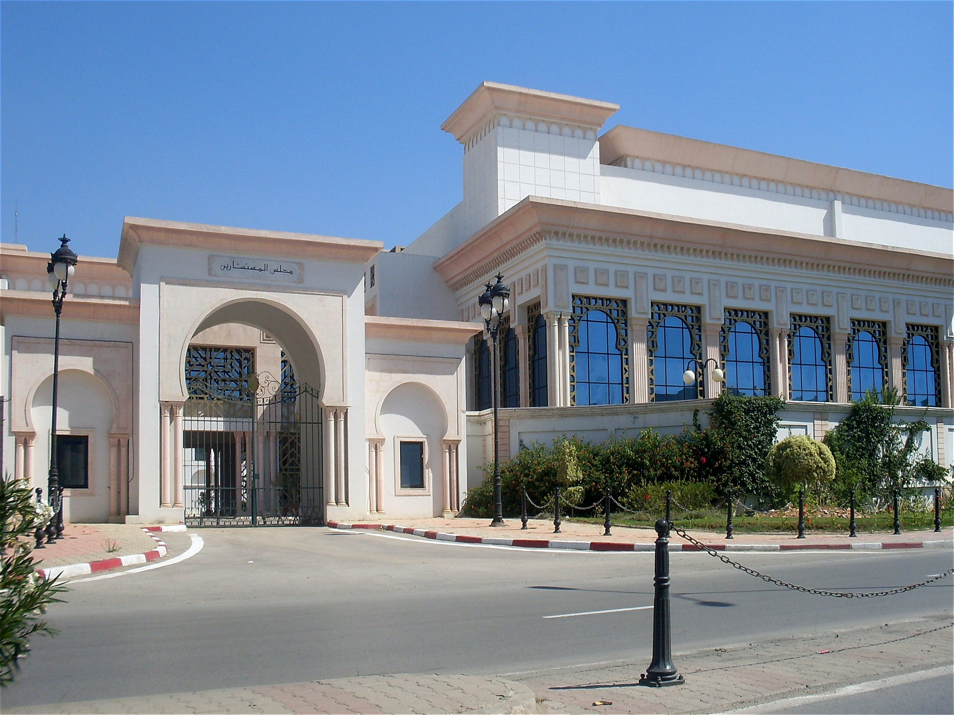 Tunisie, chambre des conseillers au Bardo